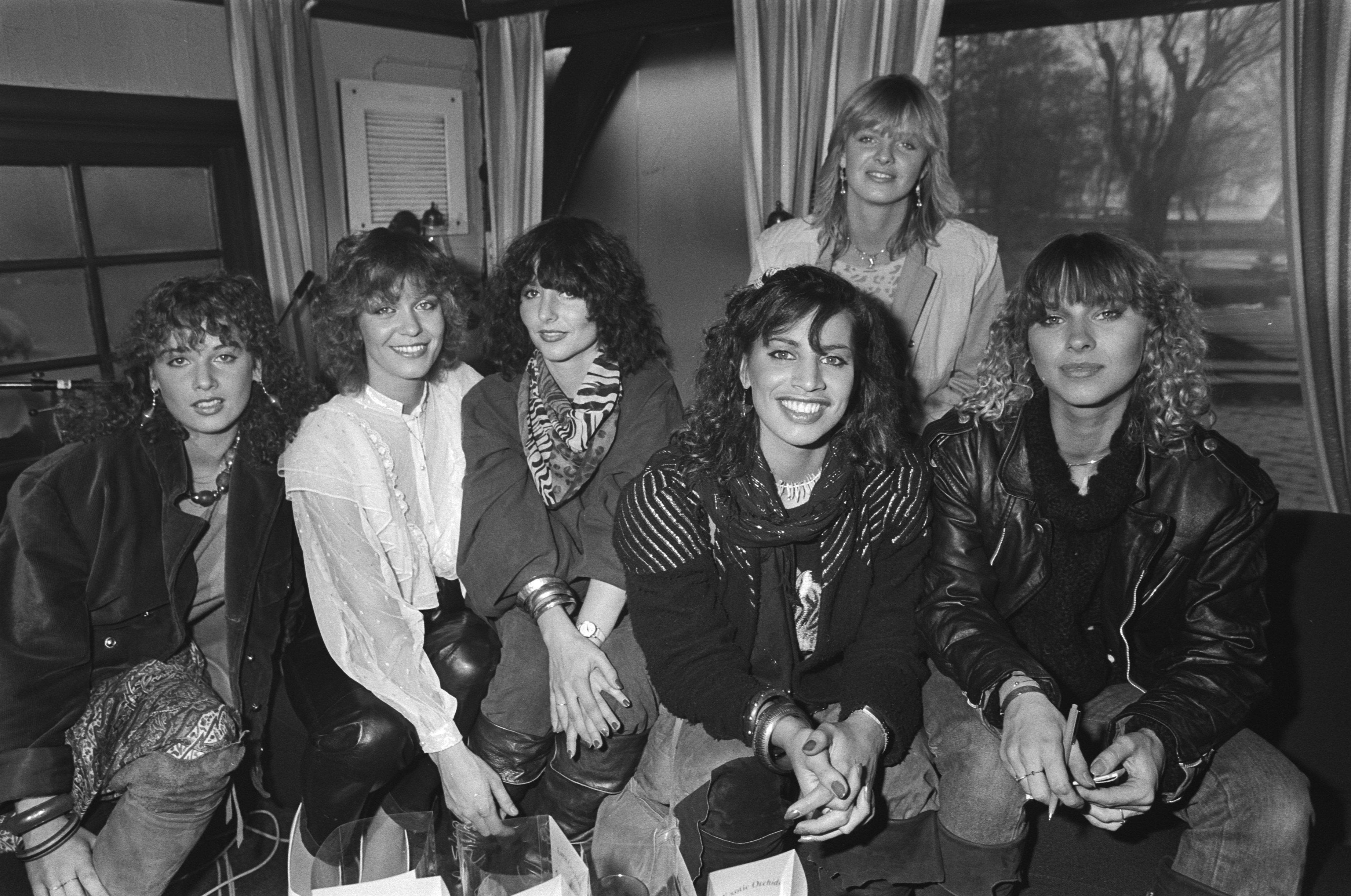 Diverse Nederlandse artiesten maken hun opwachting in het radioprogramma Open House. Dolly Dots (Achter: Angéla Kramers; Voor v.l.n.r.: Patty Zomer, Ria Brieffies †, Angela Groothuizen, Esther Oosterbeek, Anita Heilker)